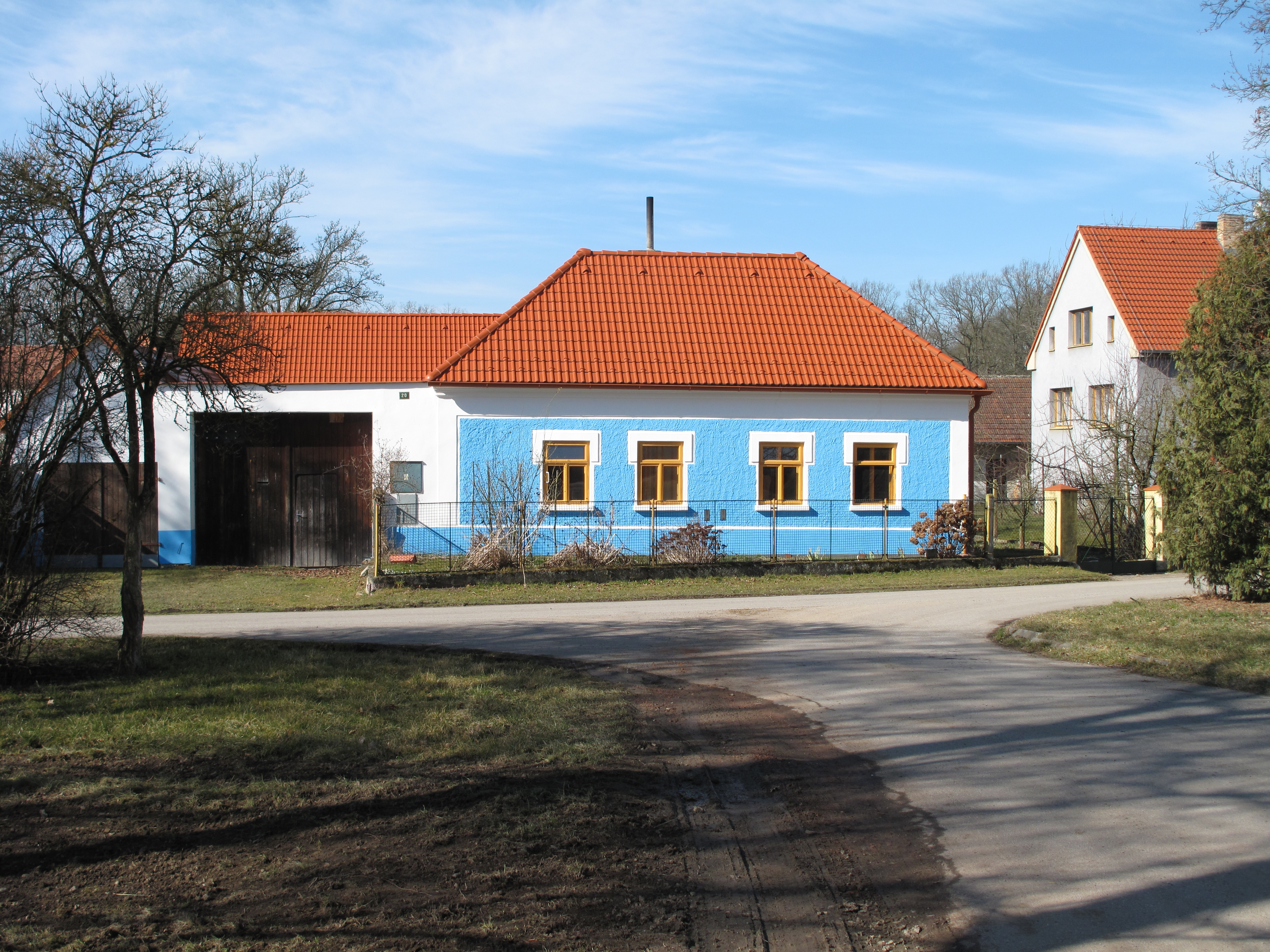 Modrý dům v Novosedlech. Okres České Budějovice, Česká republika.